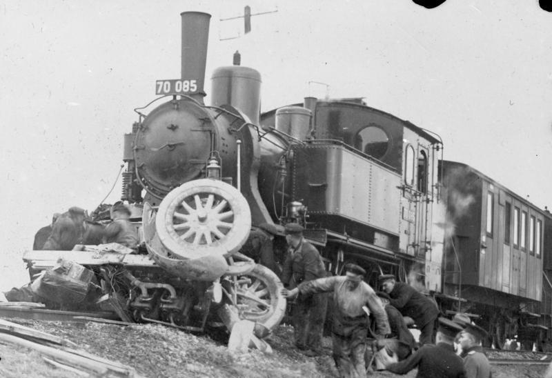 Ein Opfer der ungeschützten Bahnübergänge! Das Auto wurde von der Kleinbahn an einem ungeschützten Bahnübergang erfasst und vollständig zertrümmert. Die Insassen wurden sämtlich getötet.